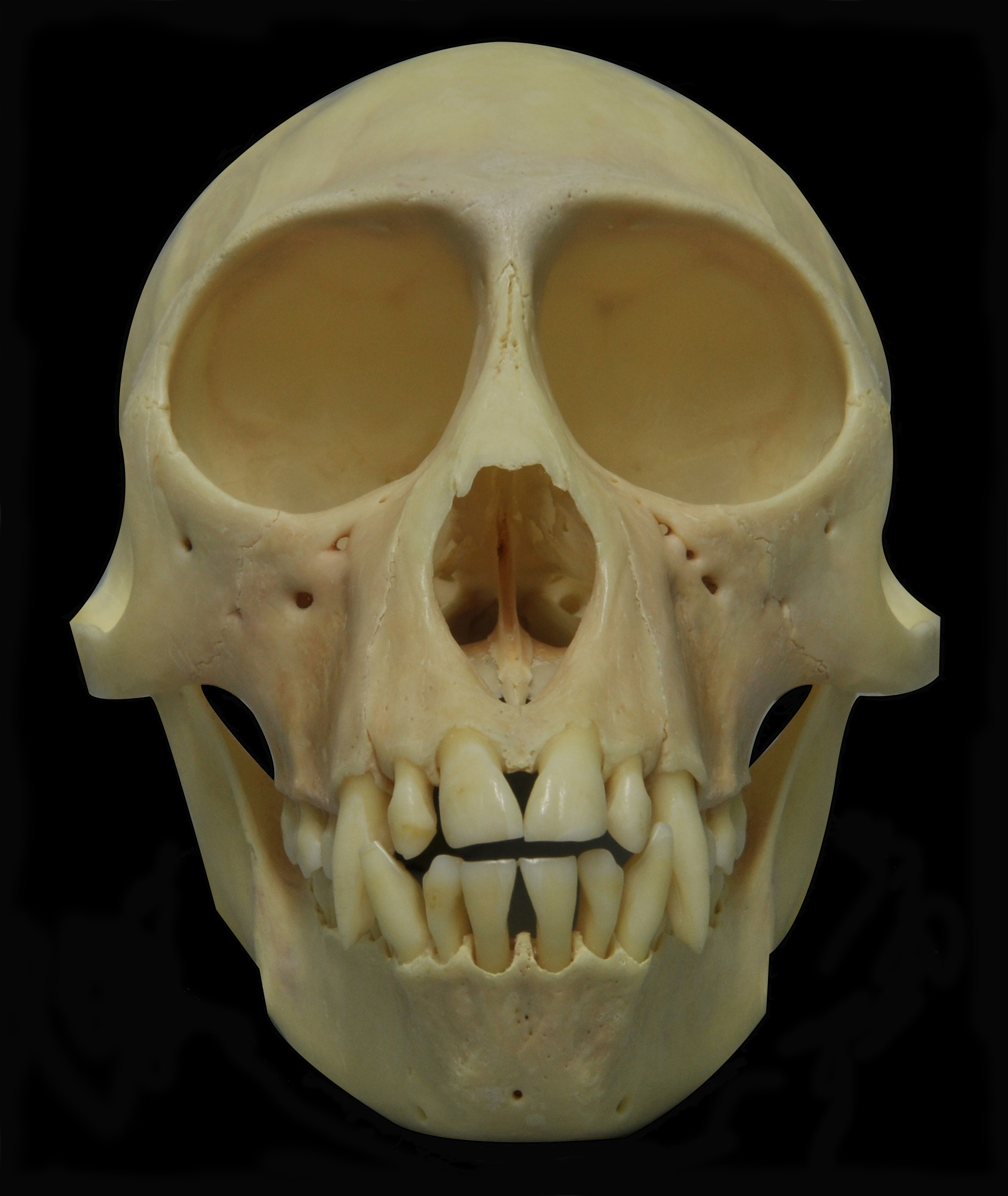 Cráneo de Cercopithecus mona, Museum Wiesbaden